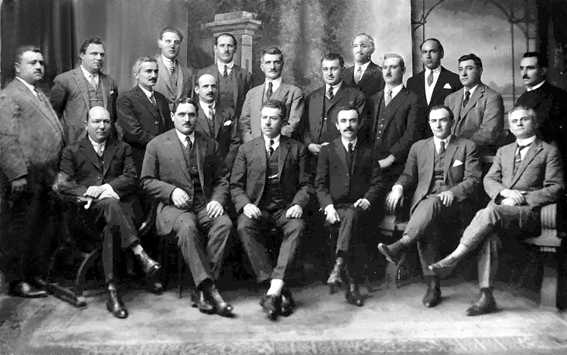 Diretoria da Sociedade Príncipe de Nápoles. O único identificado com segurança é Anselmo Beretta, o primeiro sentado à direita. Também devem estar na foto Valdemar Benetti, Domingos Zambon, Ernesto Bigarella, Dante Marcucci, Antonio Corazza, Angelo Nicola, Napoleone Ferrari, Pietro Lorenzoni, Eurico Cia, Benjamin Mascarello, Giovanni Castagnotto, Luiz Bertola, Romano Rossi e Caetano Fochesato, entre outros.